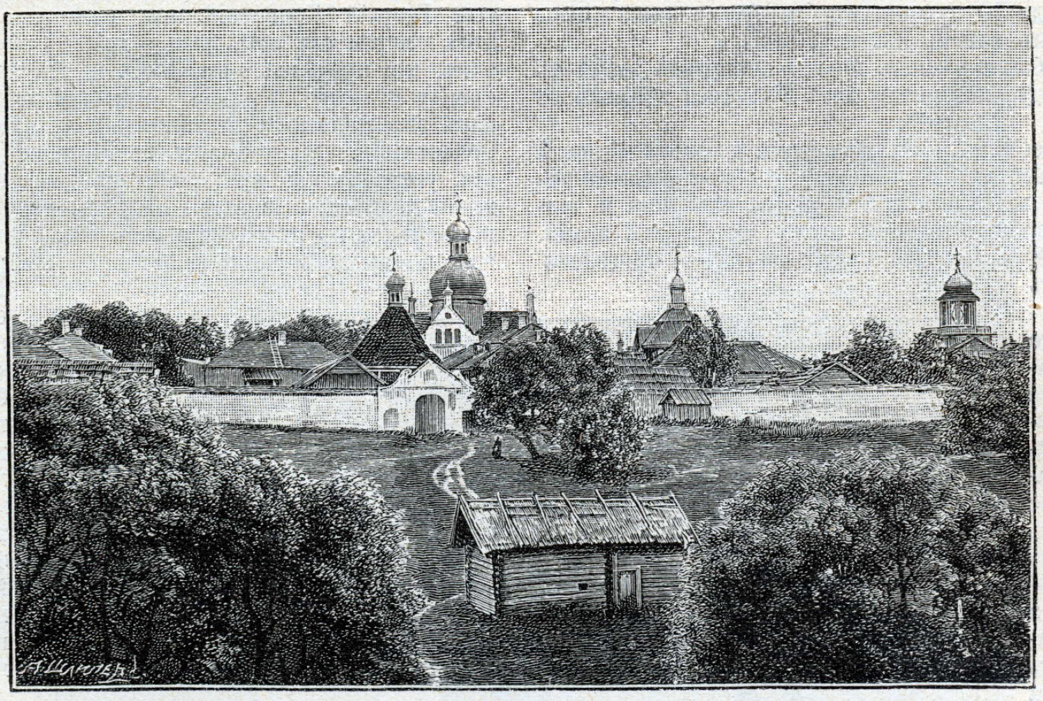 Беларуская (тарашкевіца): Ворша (Vorša), Куцейна (Kuciejna). Манастыр Прачыстай Багародзіцы